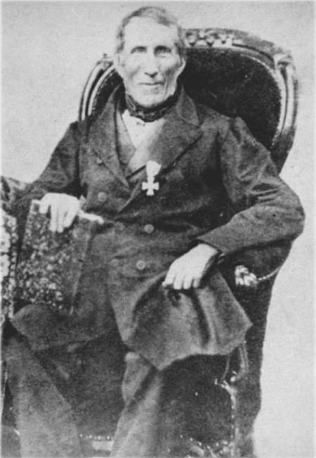 Porträt Johannes Schué (um 1860)